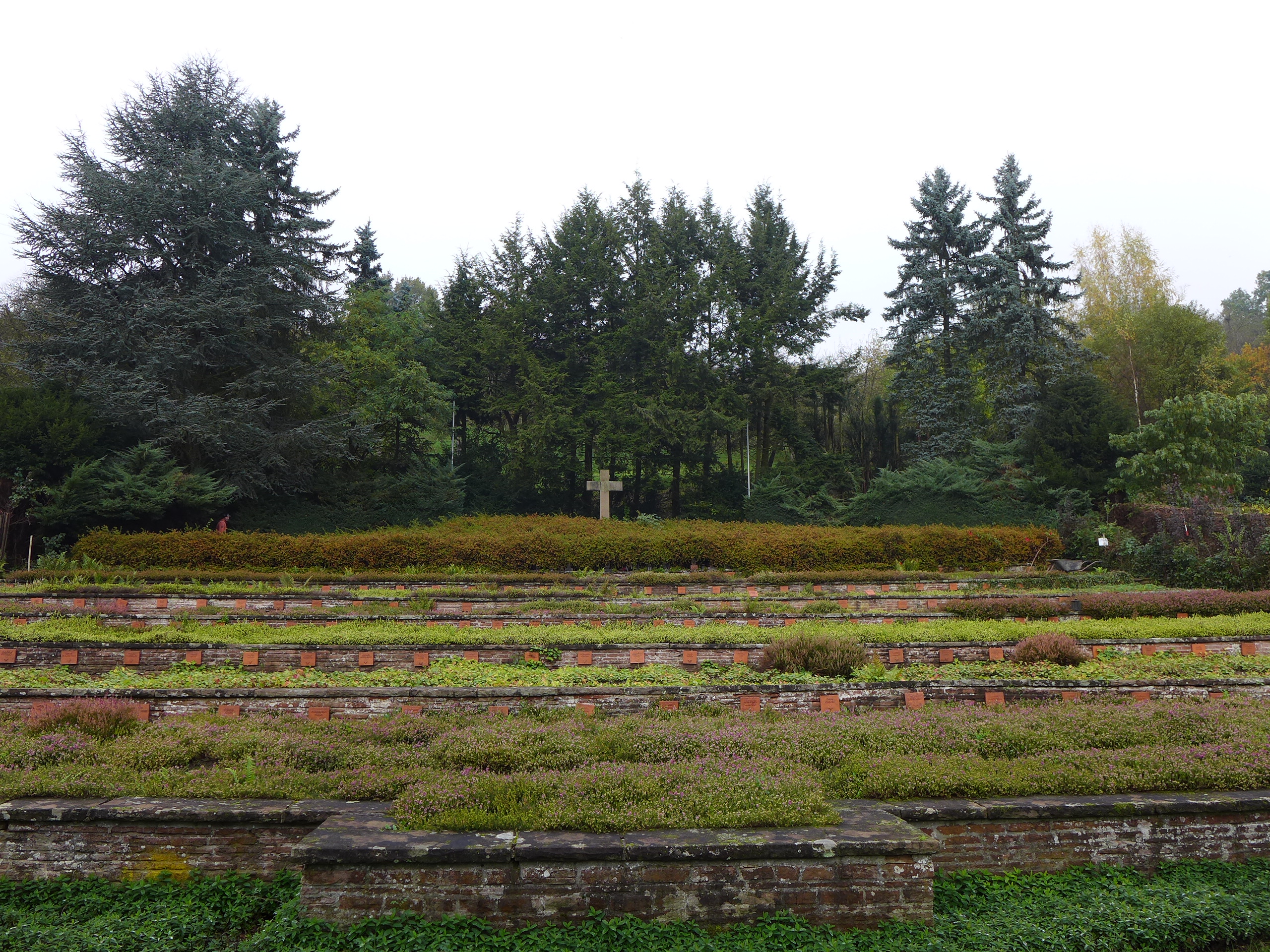 Diefflen, Ehrenfriedhof in der Nalbacher Straße